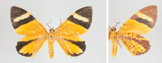 Hagnagora clustimena